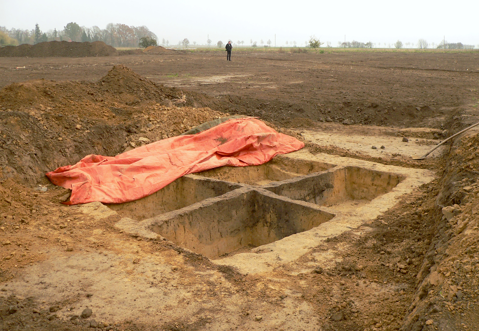 Ausgrabungstätte in einer vorgeschichtlichen Abfallgrube in Schellerten, Kreis Hildesheim, Niedersachsen